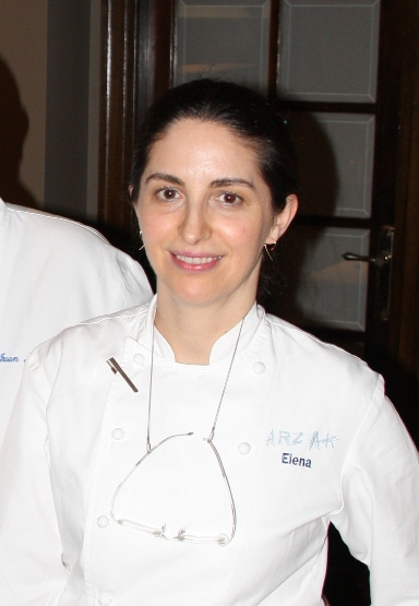 Elena Arzak en el restaurante que lleva su apellido y el de su padre